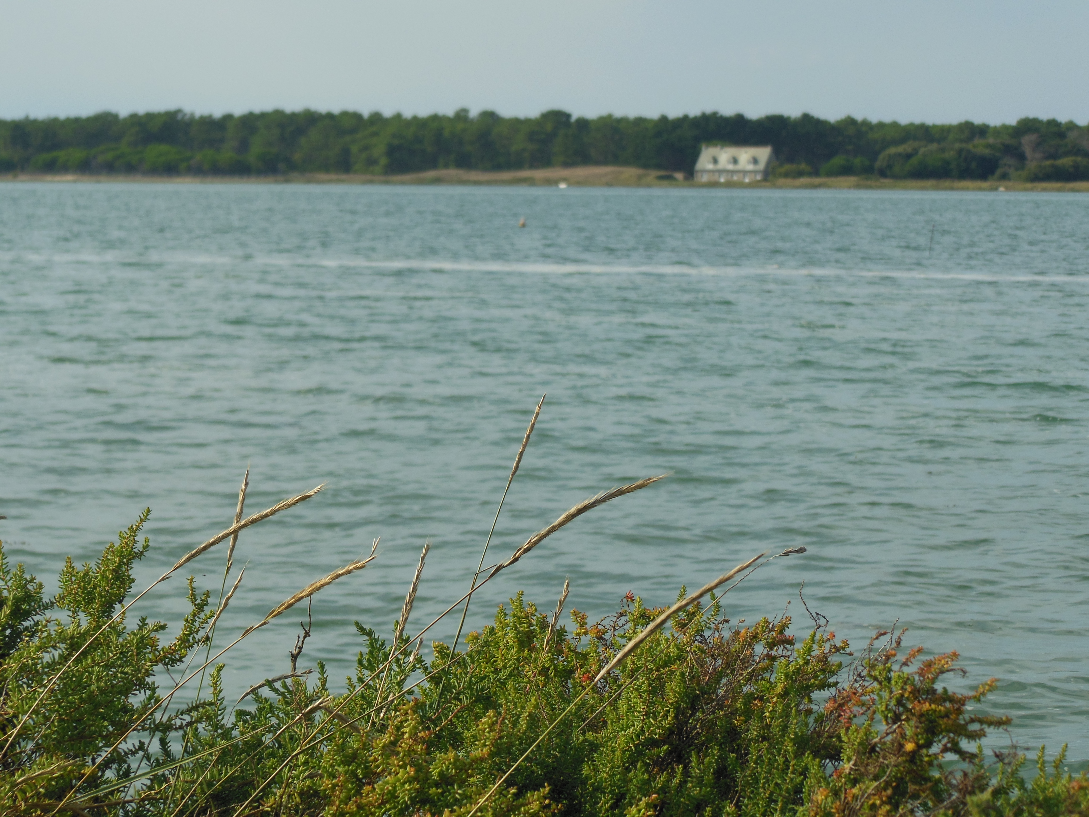 Sissable, vue sur le petite Traict du Croisic et Pen Bron (La Turballe)